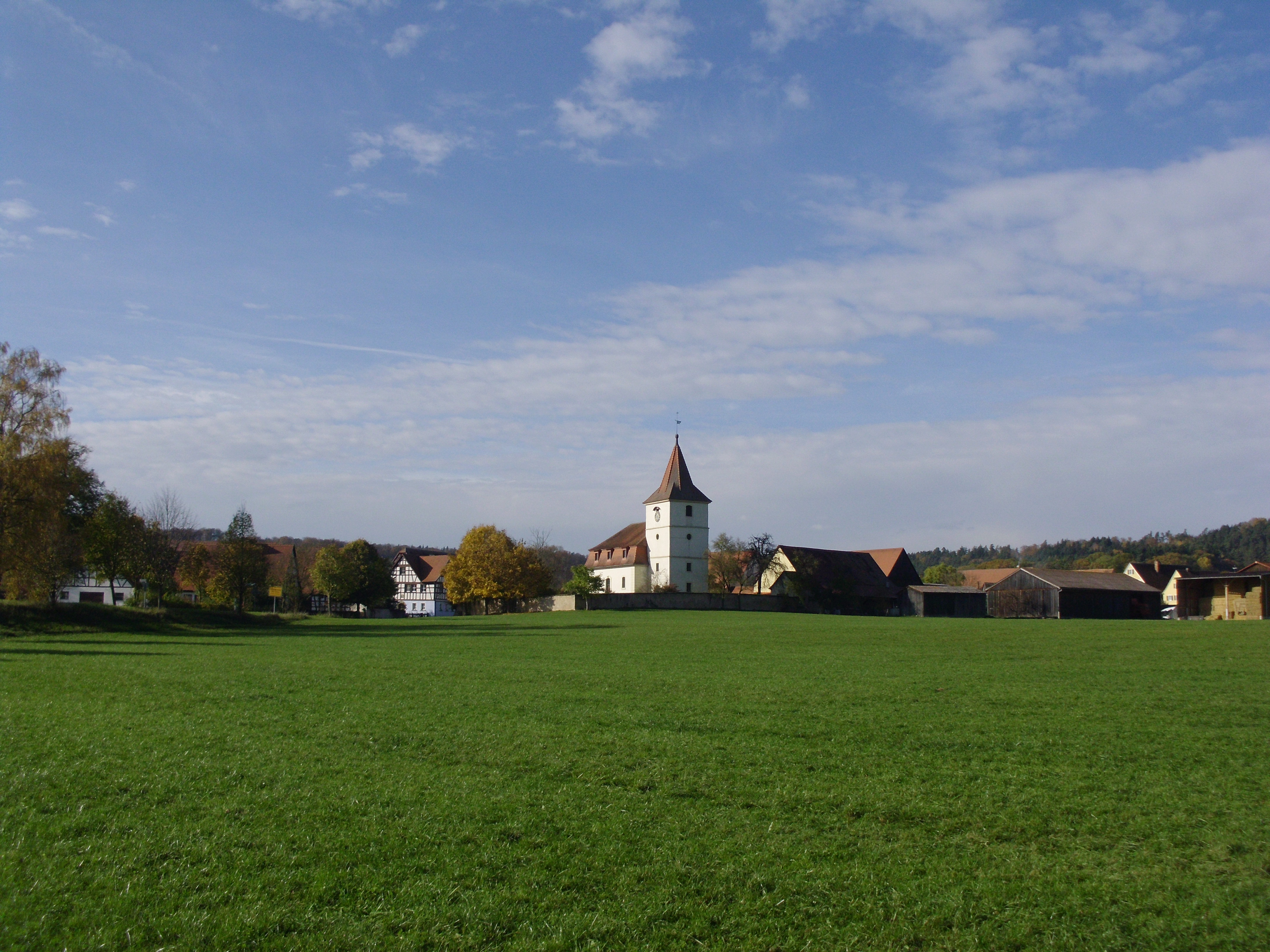 Häslabronn mit der ehemaligen Wallfahrtskirche St. Jakob